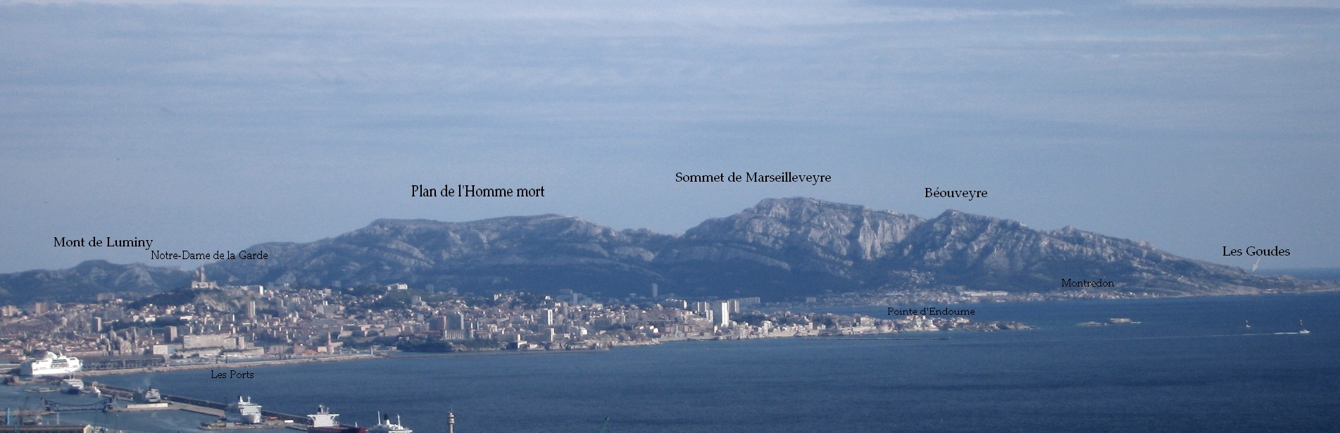 Vue panoramique du massif de Marseilleveyre, avec repères (réalisé d'après une photo originale de User:Imac.vincent, sur Commons sous le nom Port Autonome de Marseille.JPG)